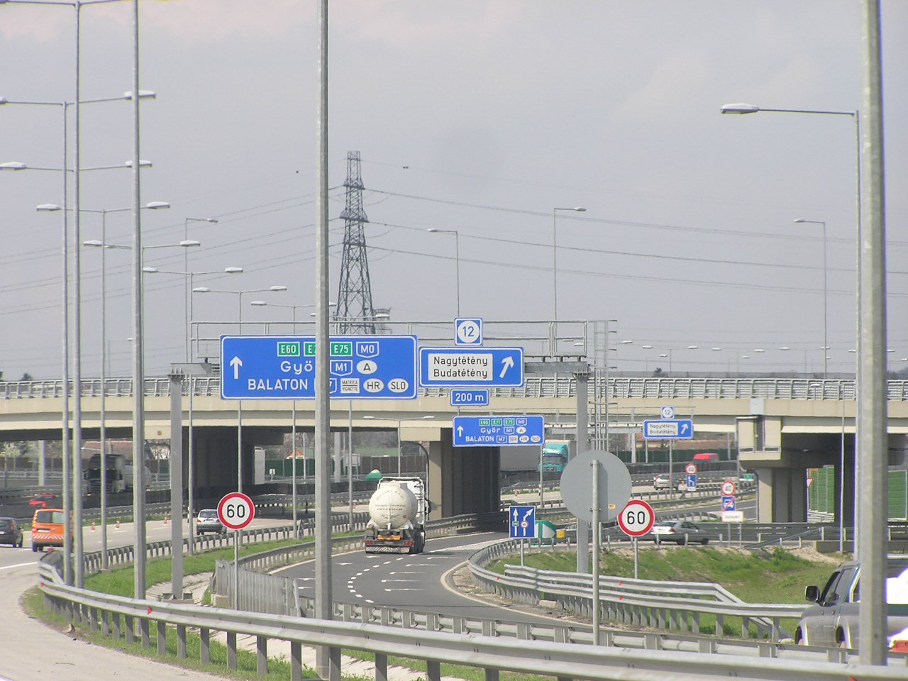 Autobahn M0 aus Richtung Autobahn M5 kommend.